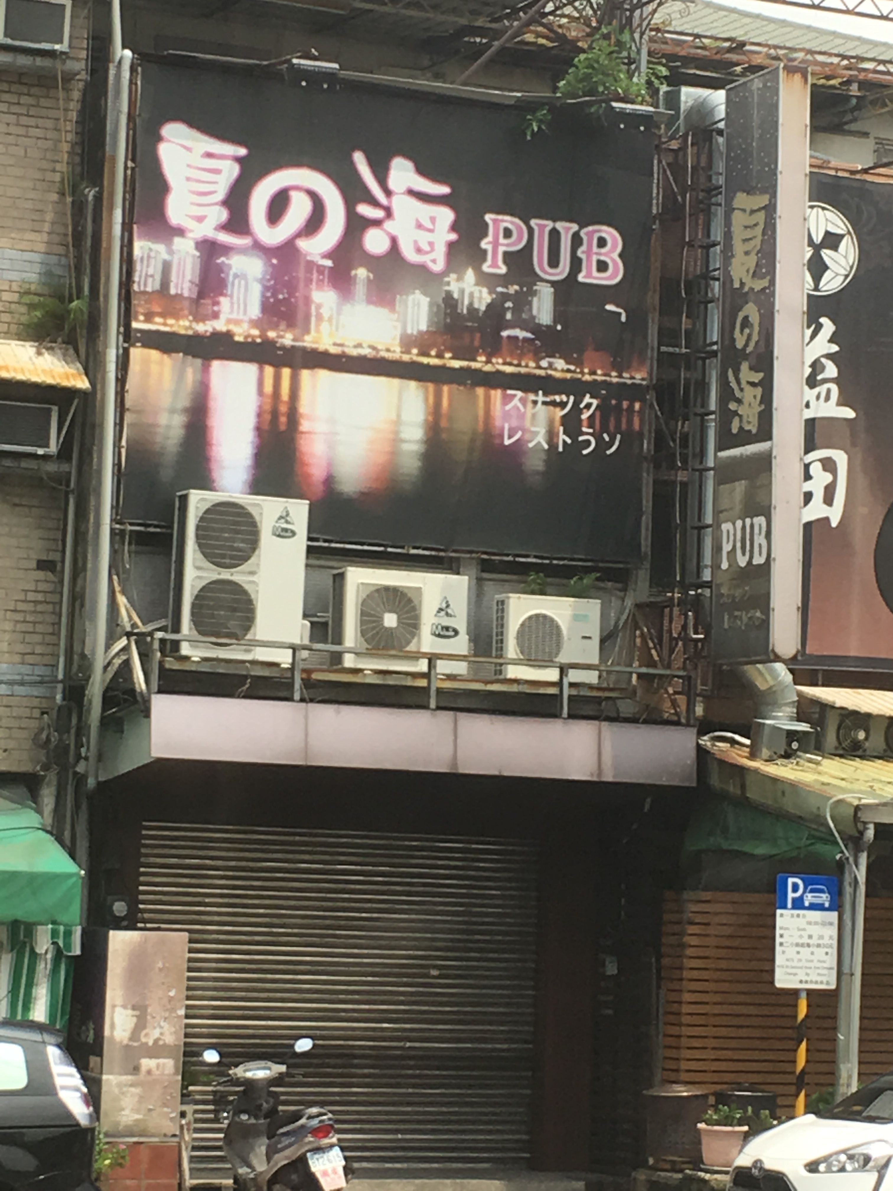 台湾の店舗での日本語の誤植例